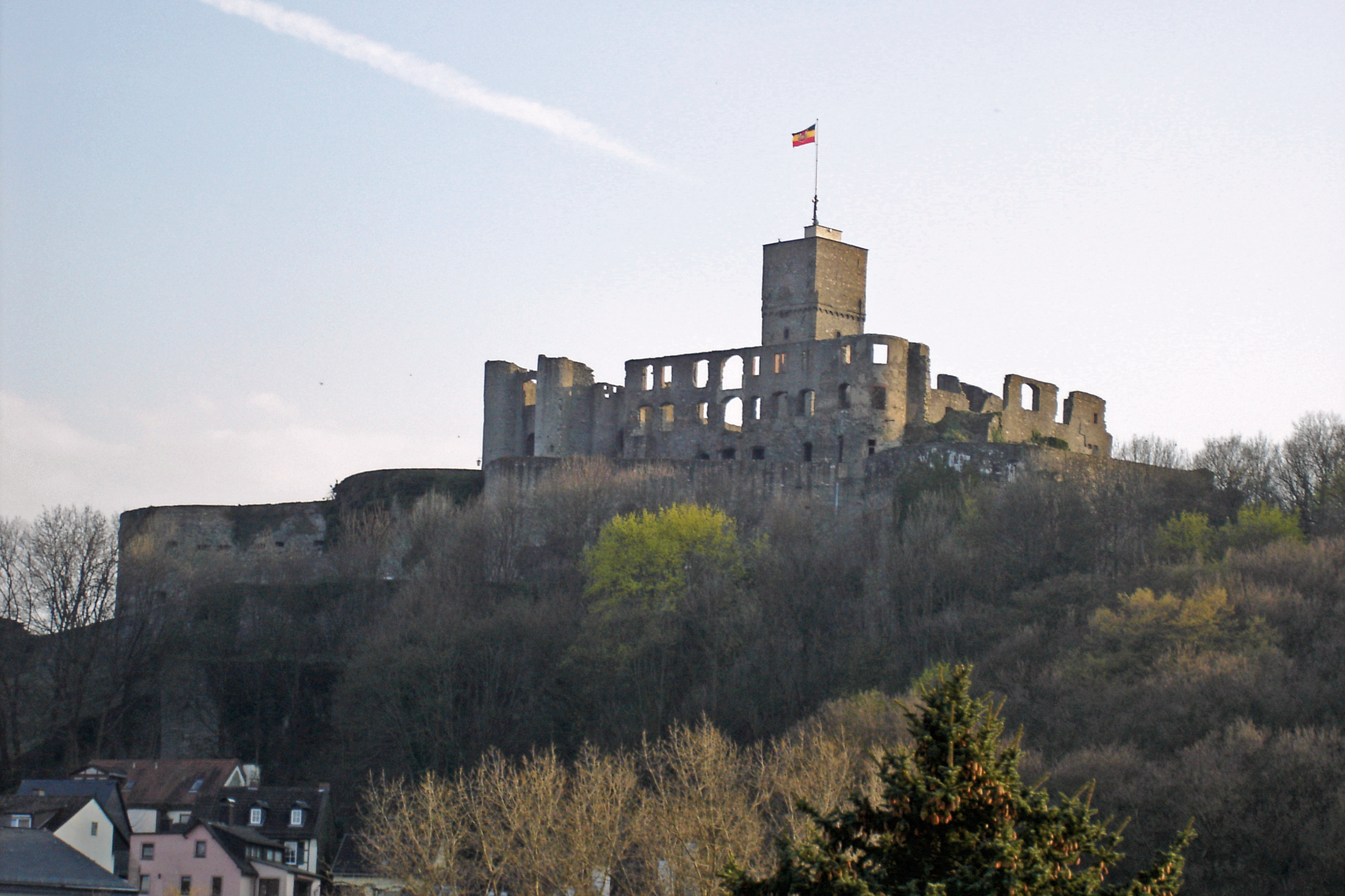 Burgruine Koenigstein